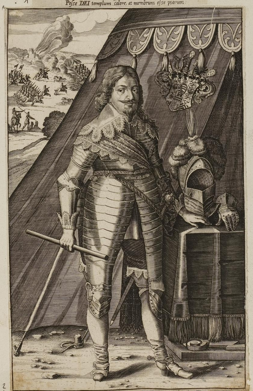 Grafik aus dem Klebeband Nr. 1 der Fürstlich Waldeckschen Hofbibliothek Arolsen Motiv: Johann Ernst I., Herzog von Sachsen-Weimar